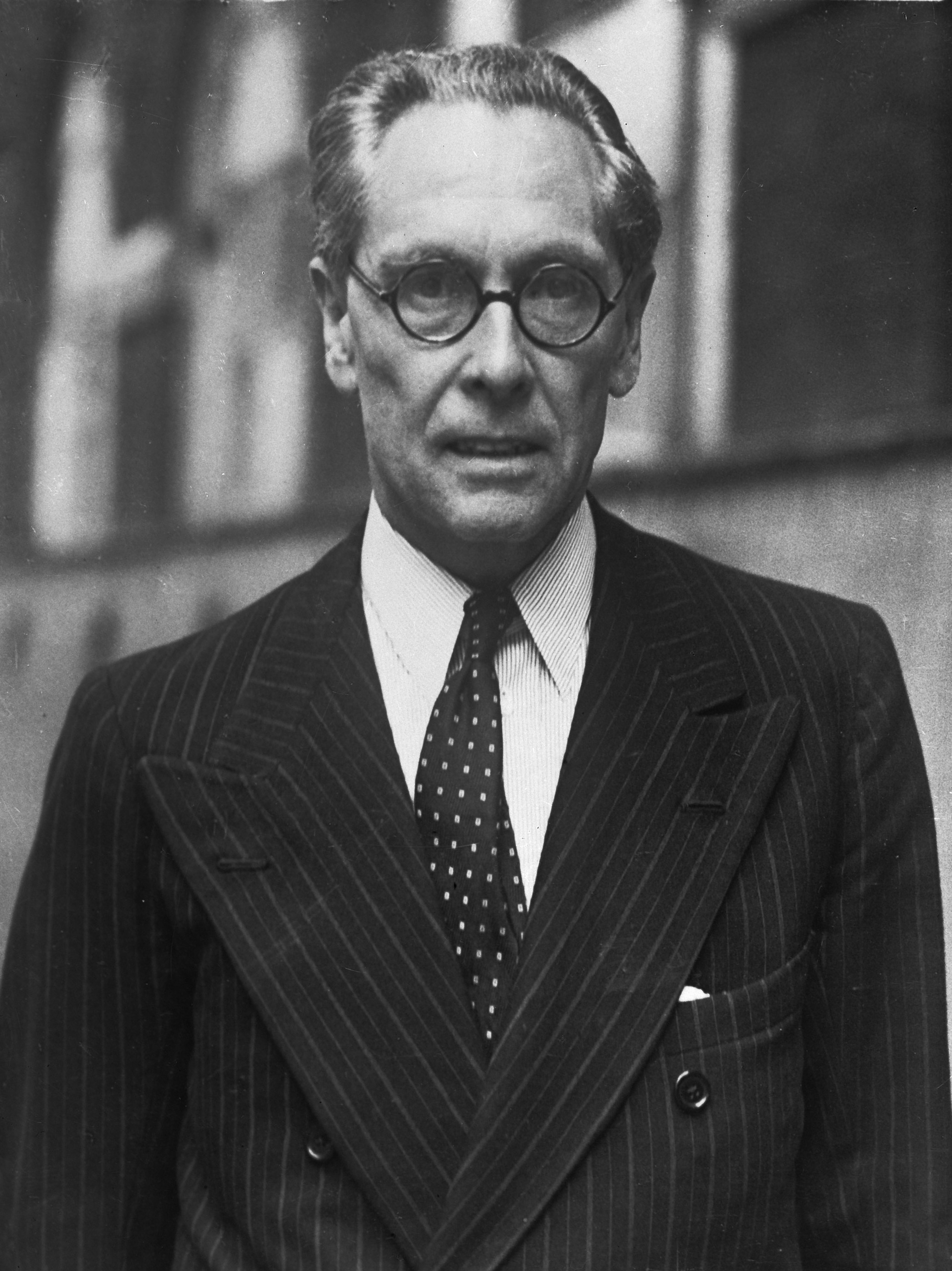 Philip Noel-Baker (Britse onderminister (minister of State) van Buitenlandse Zaken)